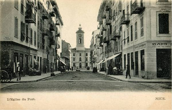 La rue Bavastro vers 1910. Au fond, l'arrière de l'église du port